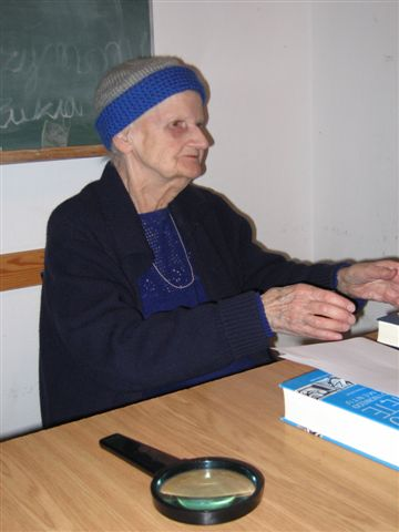 Anna Świderkówna (1925-2008)